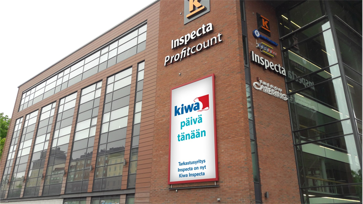 Kiwa Inspectan pääkonttori, Sörnäistenkatu 2